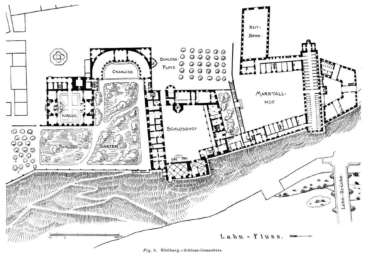 Lageplan des Schlosses Weilburg, Hessen, Deutschland (gezeichnet Ferdinand Luthmer 1907)